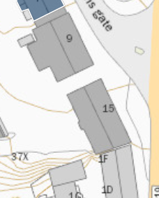 Welhavens gate nå